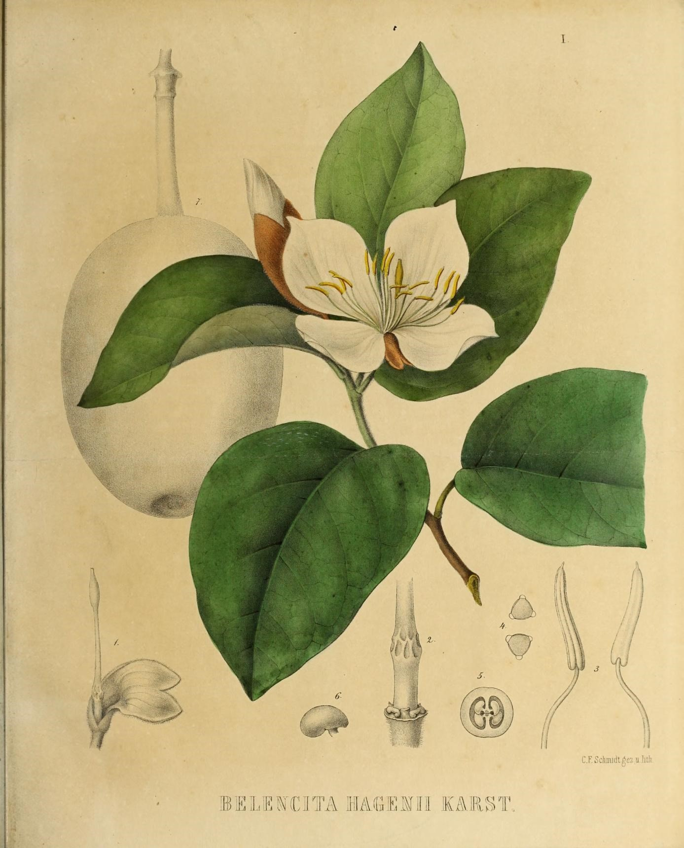 Berliner allgemeine Gartenzeitung.